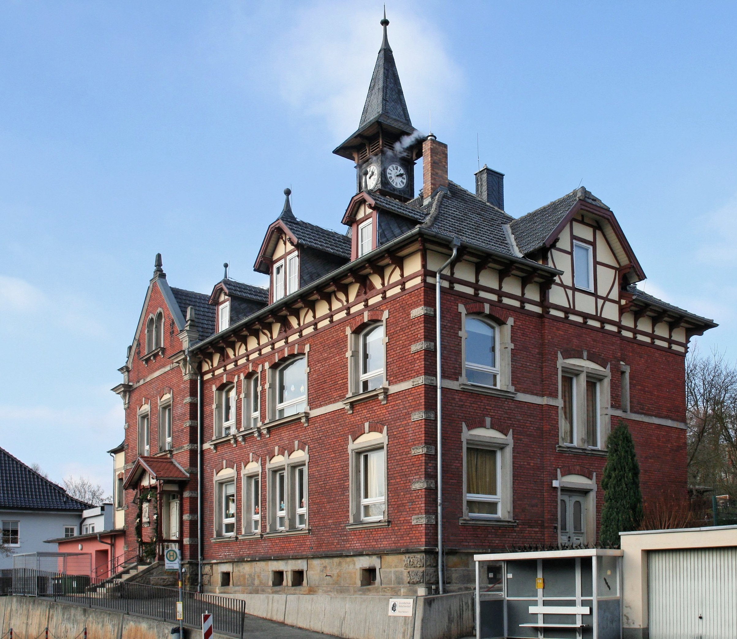 Beschreibung: Neue-Heimat-Schule, Neue Heimat 5 in Coburg *Quelle: Fotograf Störfix *Datum: 25. Januar 2009 ==